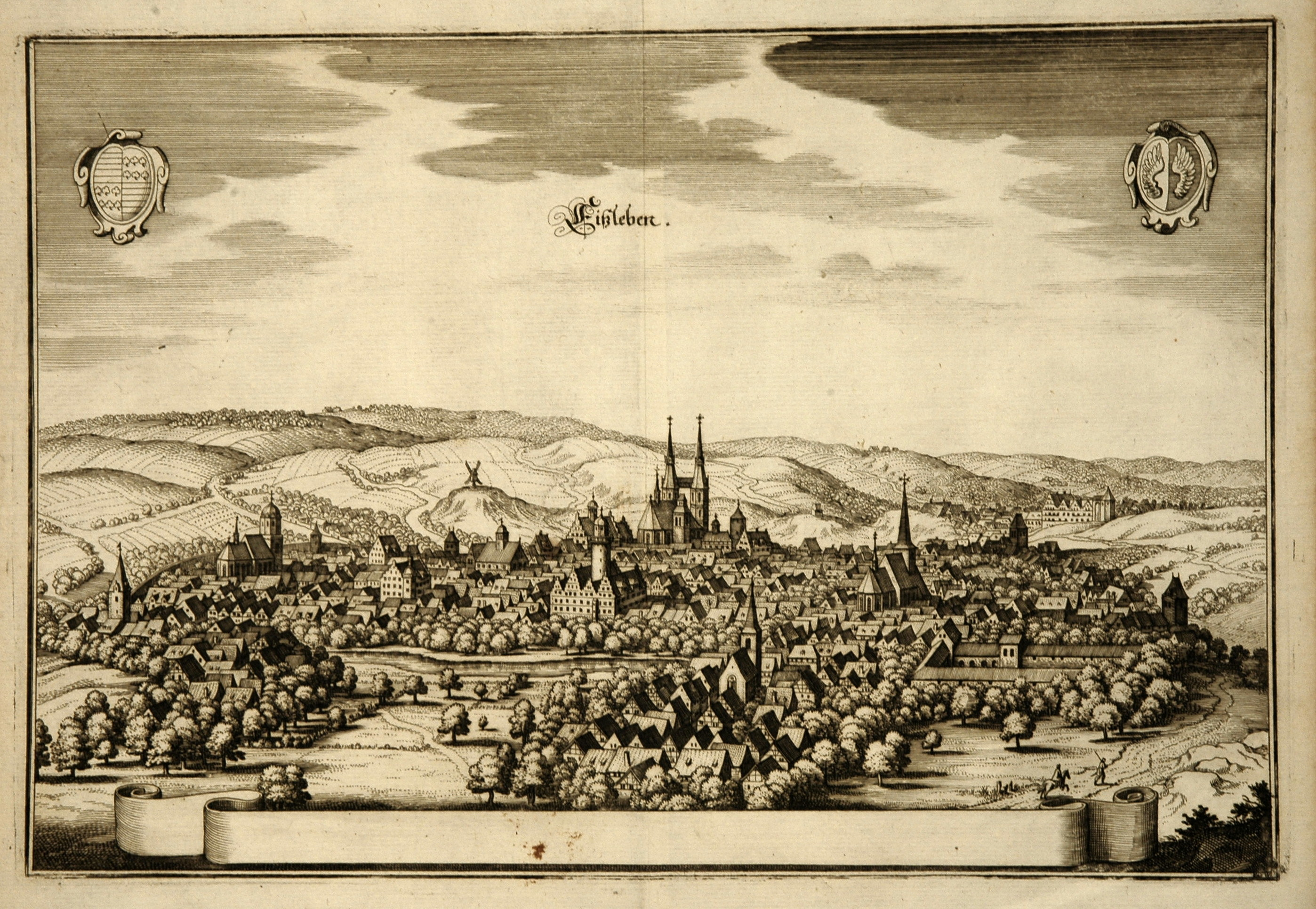 Kupferstich 23 x 34,5 cm aus Matthäus Merian: Topographiae Superioris Saxoniae Thüringiae 1650